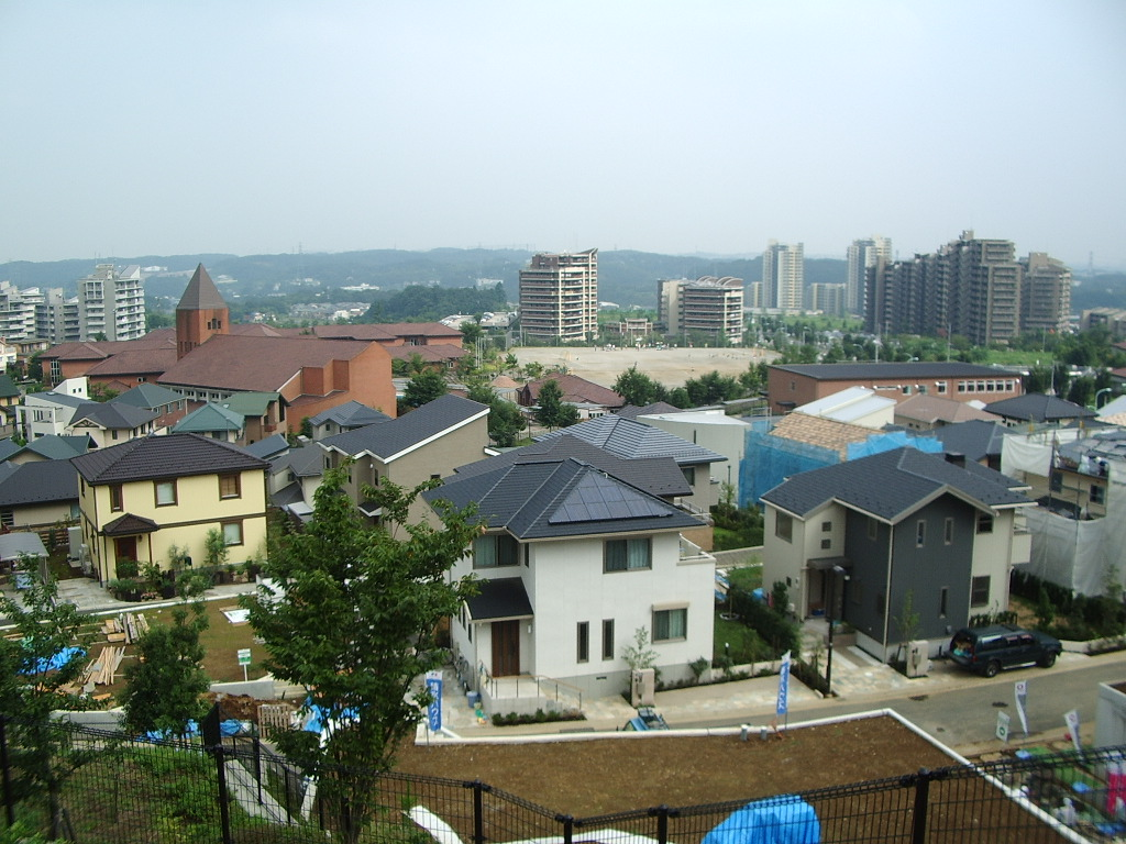 wakabadai, inagi